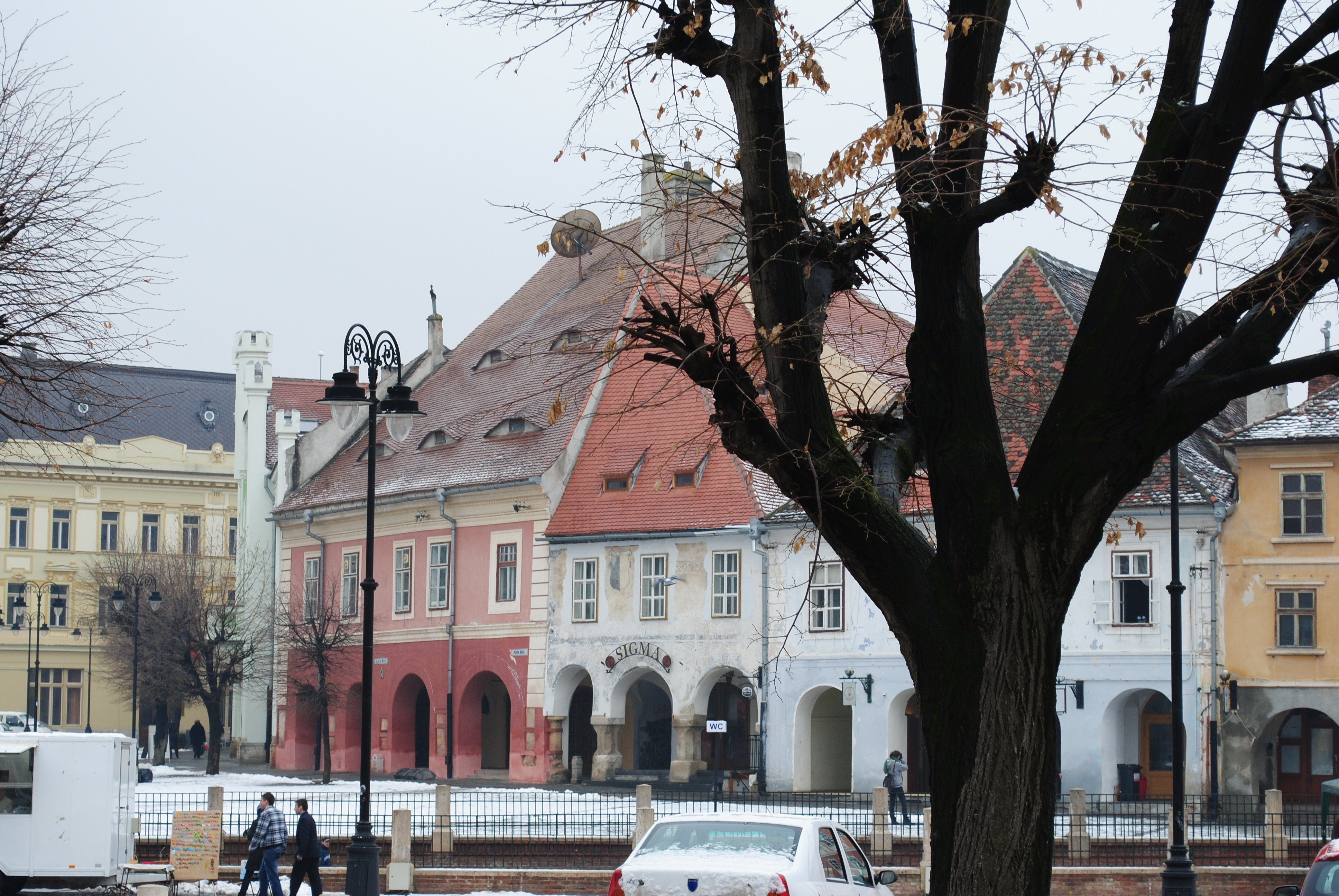 Casă (înglobează fragment incinta I), sec. XV - XVI, sf. sec. XVIII